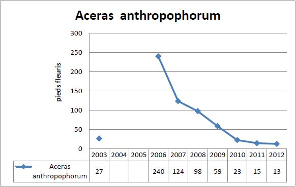 Evolution des effectifs d'Aceras Homme-pendu sur la carrière des Nerviens